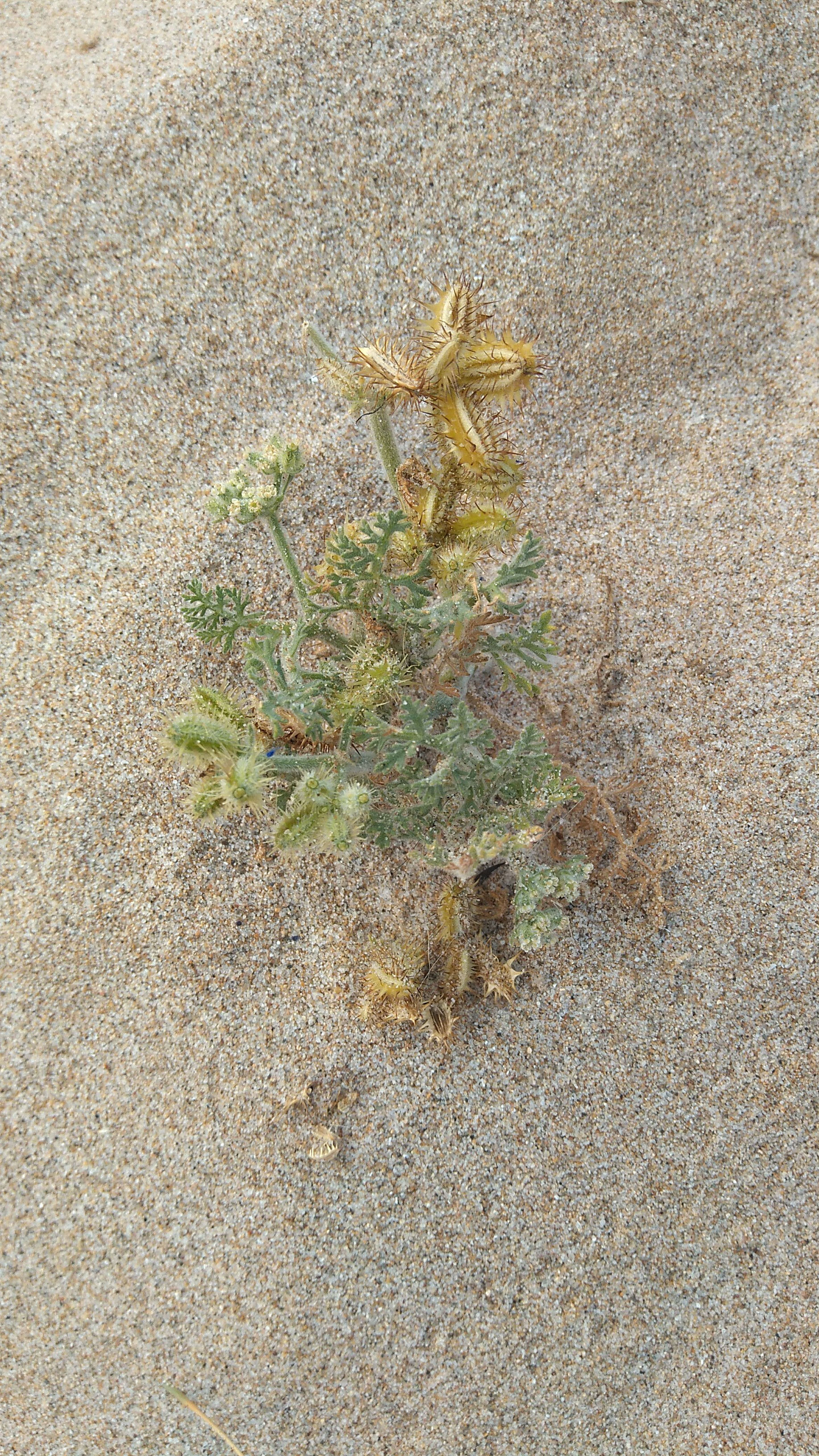 Pseudorlaya pumila, els Muntanyans (Catalunya)